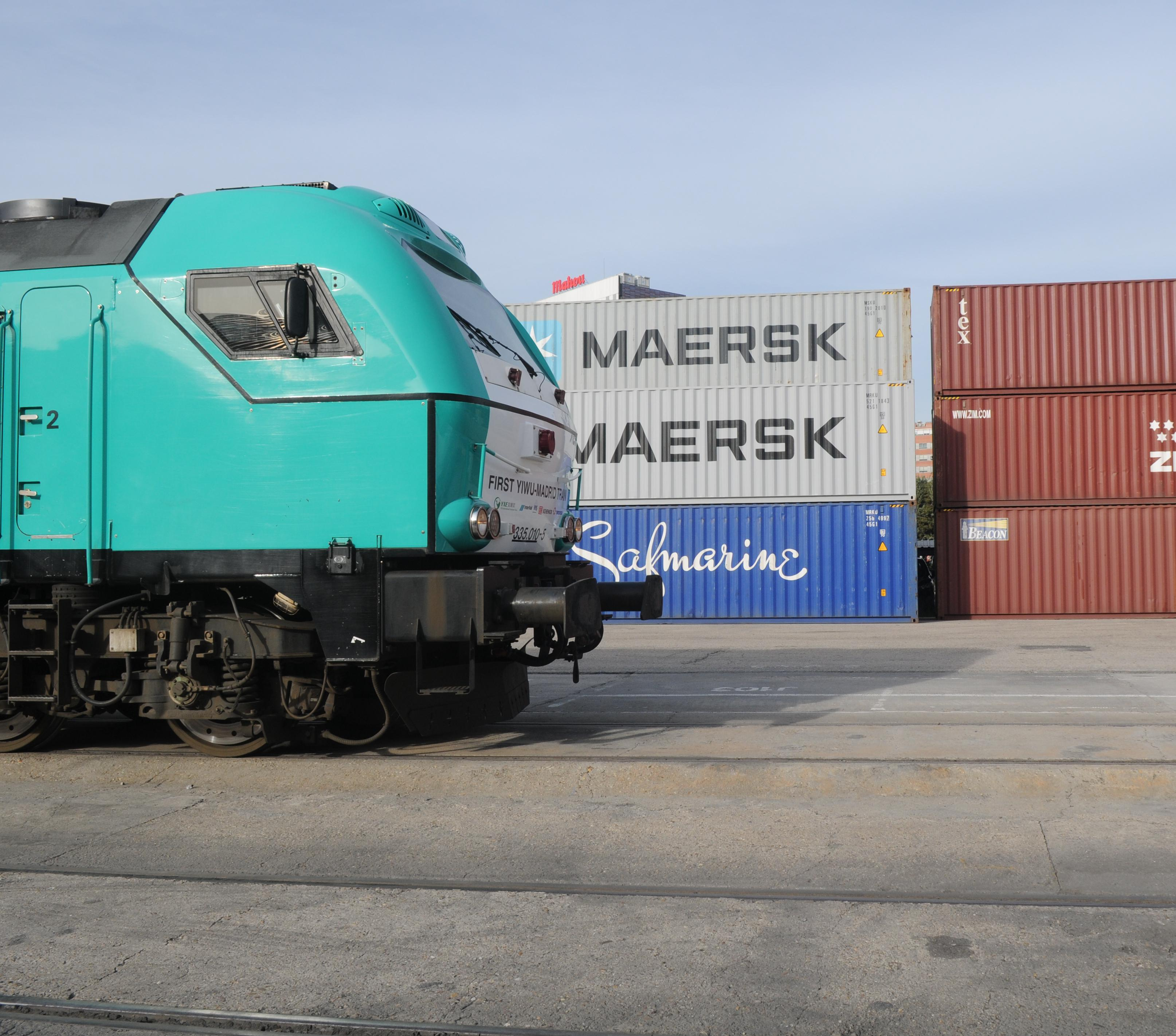 Este domingo, 18 de noviembre, comienzan los actos para conmemorar el cuarto aniversario de la puesta en funcionamiento del recorrido ferroviario más largo del mundo, Madrid-Yiwu. La semana conmemorativa arranca a las 8.45 horas con un evento inaugural al que asistirá el coordinador general de Alcaldía, Luis Cueto, acompañado por el presidente de la Fundación para el Intercambio entre Yiwu y España, Mao Wenjin.